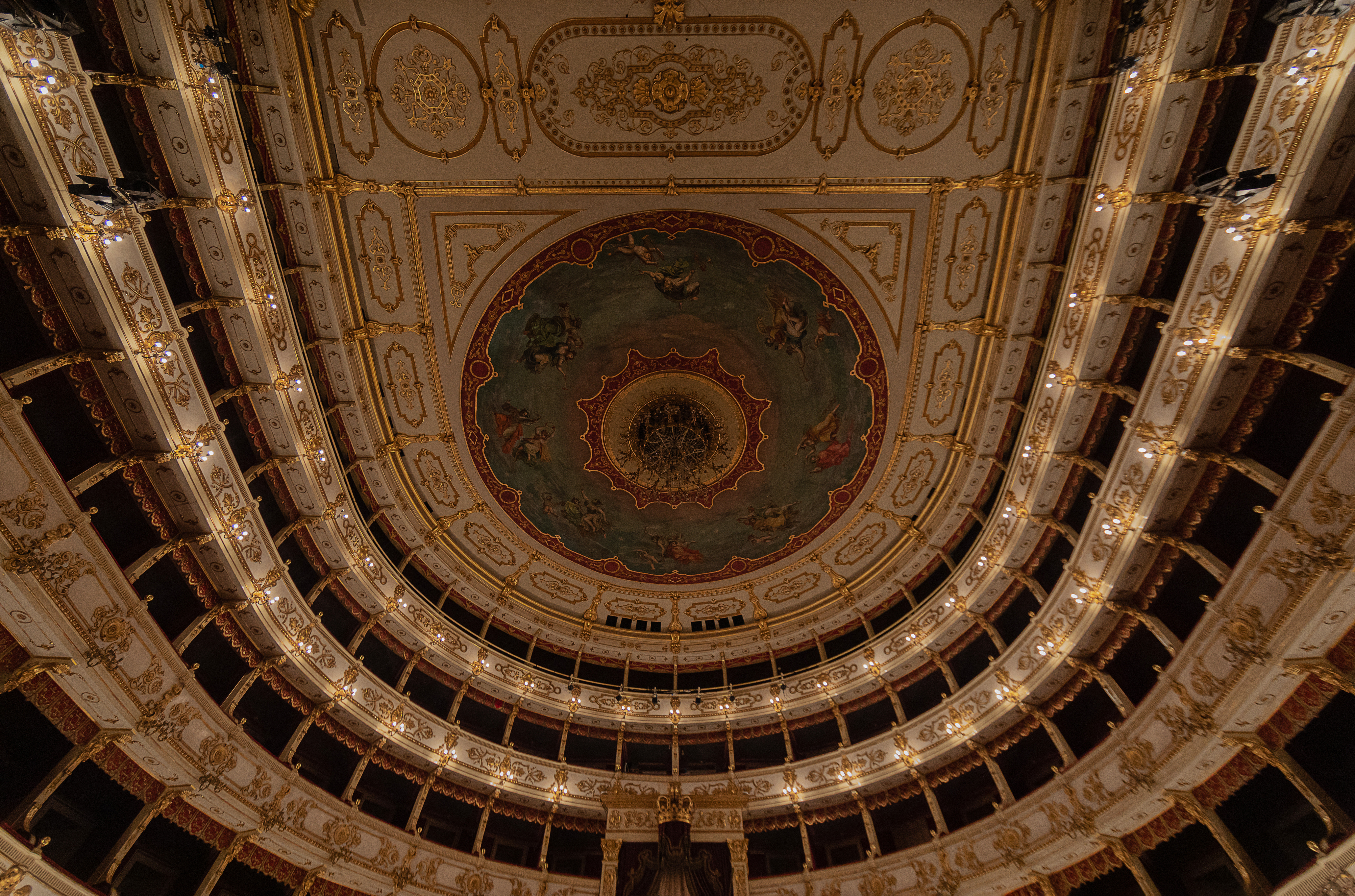 Teatro Regio This is a photo of a monument which is part of cultural heritage of Italy.